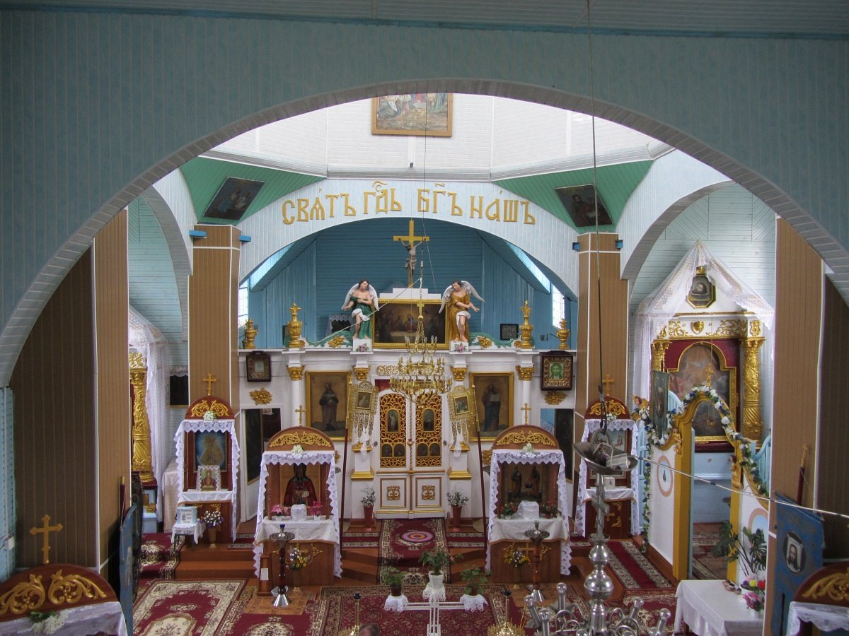 Царква ў Порплішчы